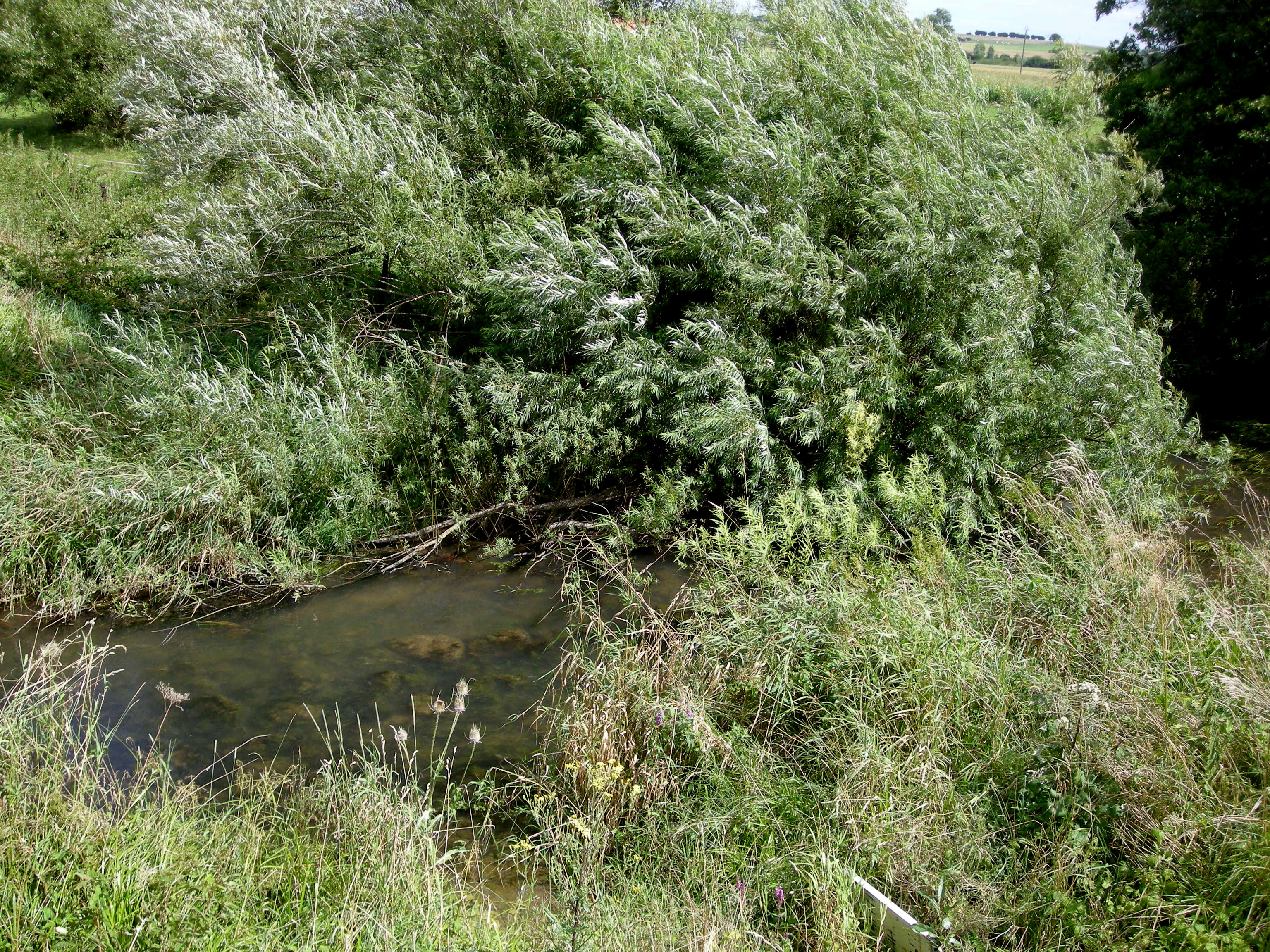 La Verdurette à Reherrey (Meurthe-et-Moselle)